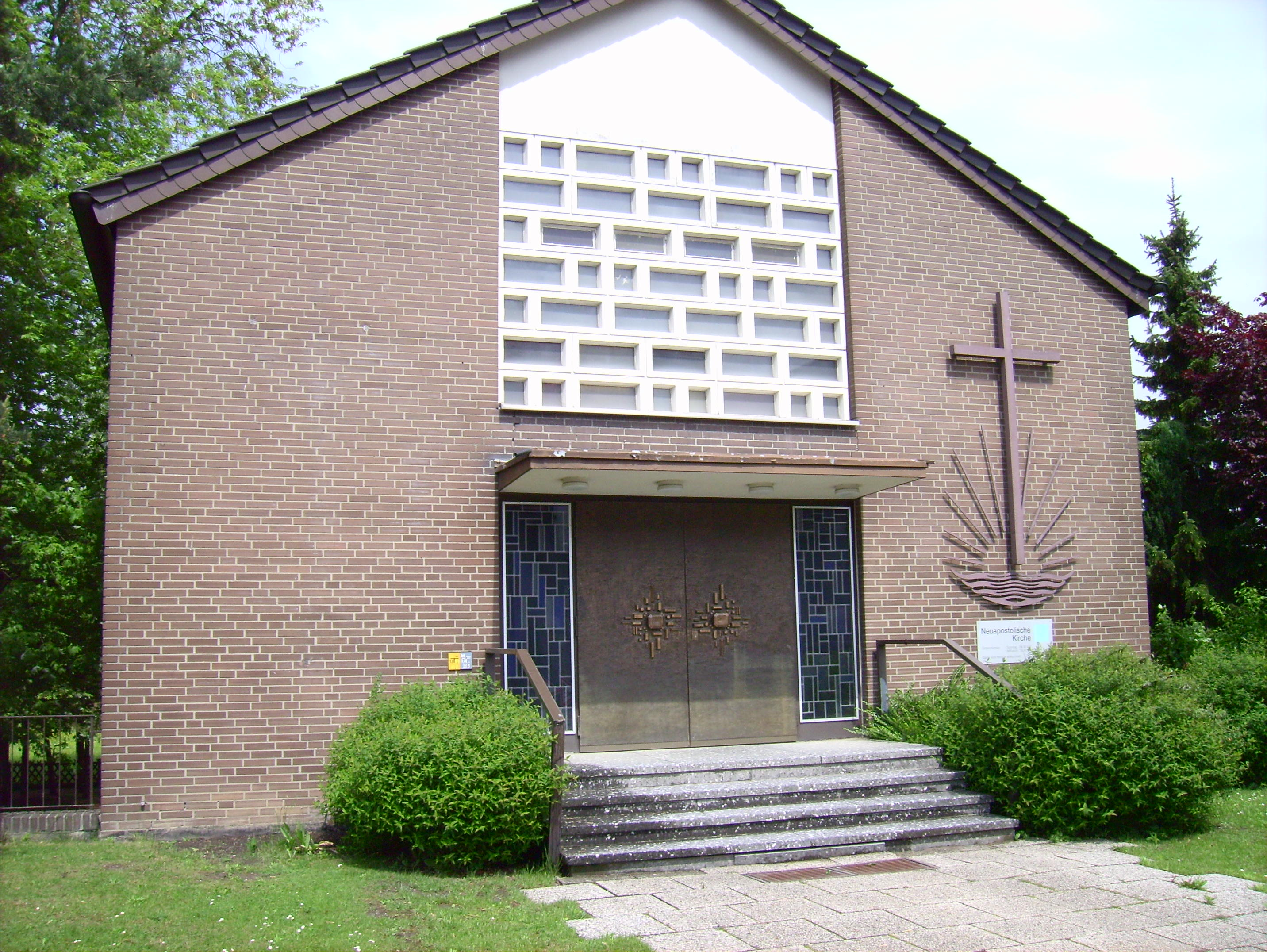 Die Neuapostolische Kirche in Dortmund-Lanstrop